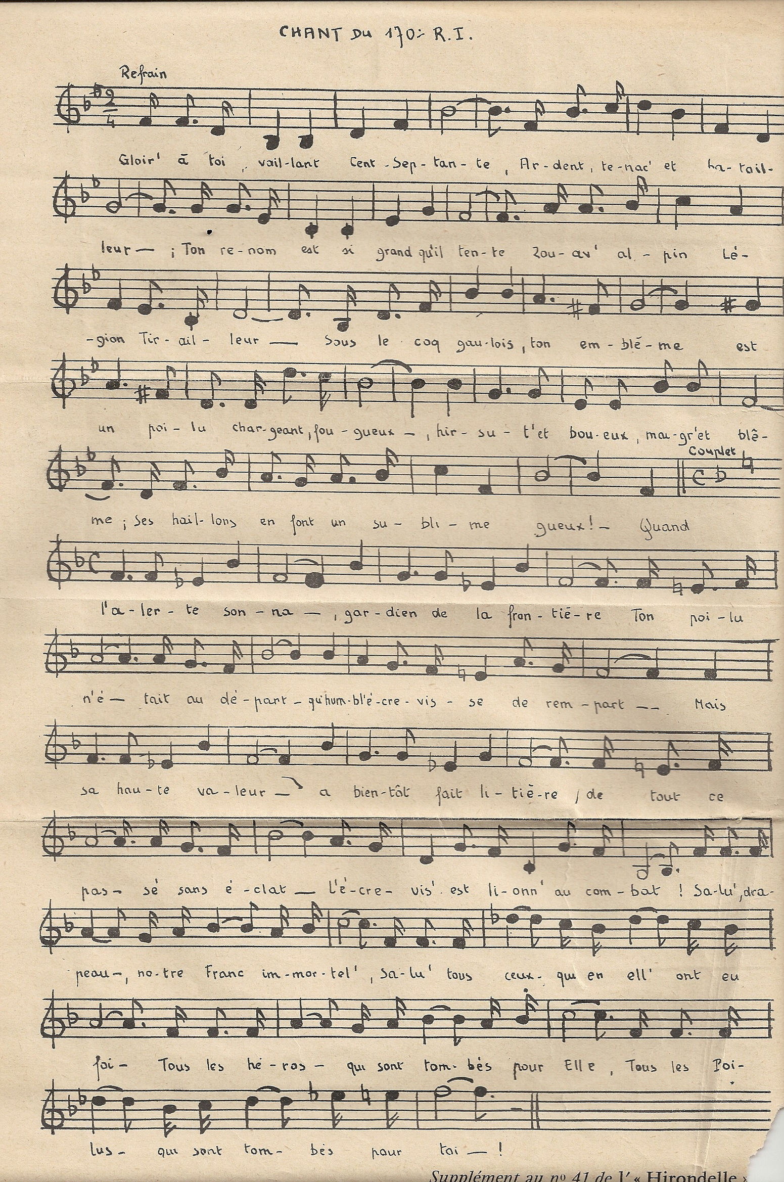 musique du chant du 170e RI